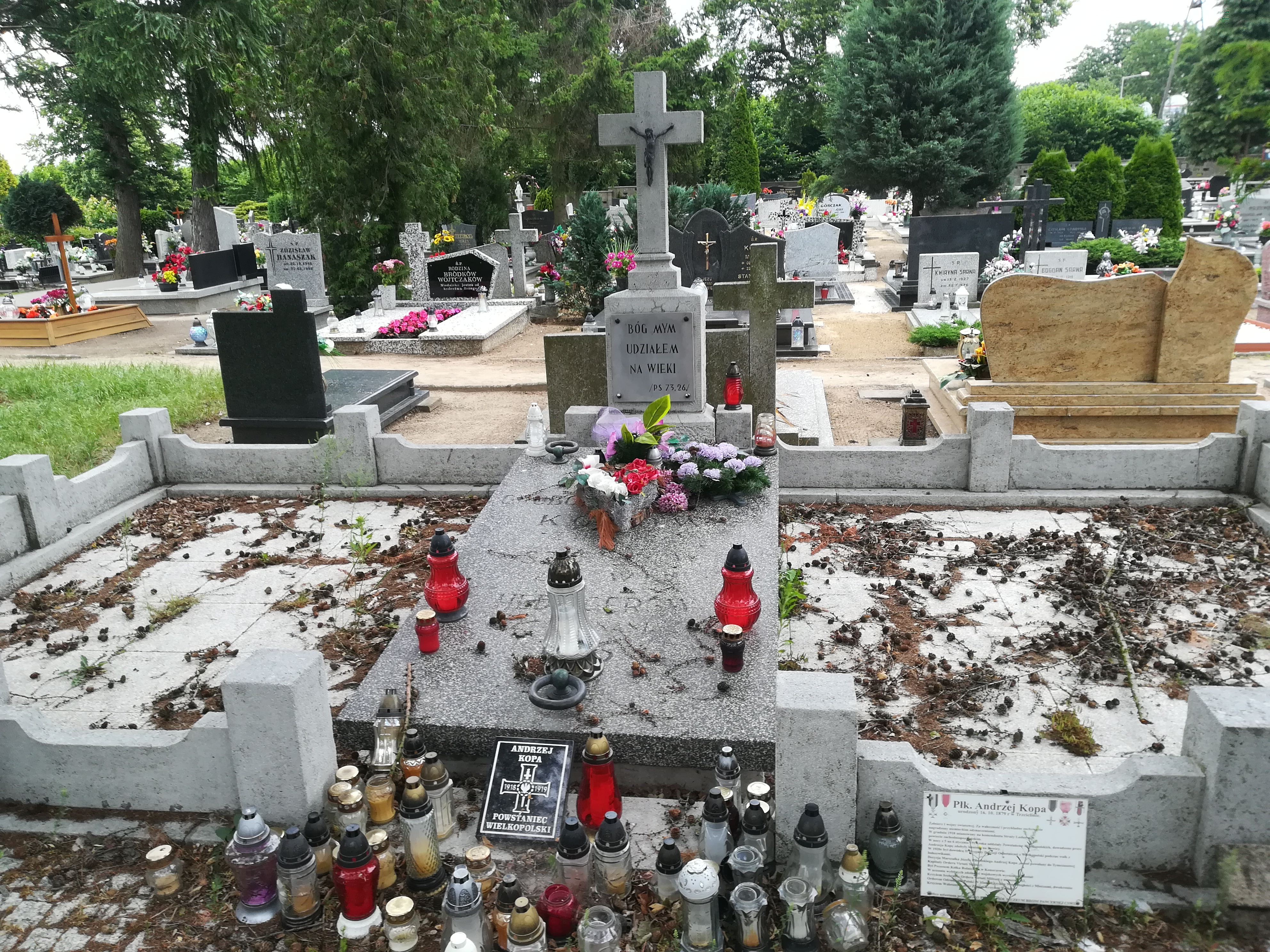 Grób płk. Andrzeja Kopy w Konarzewie.